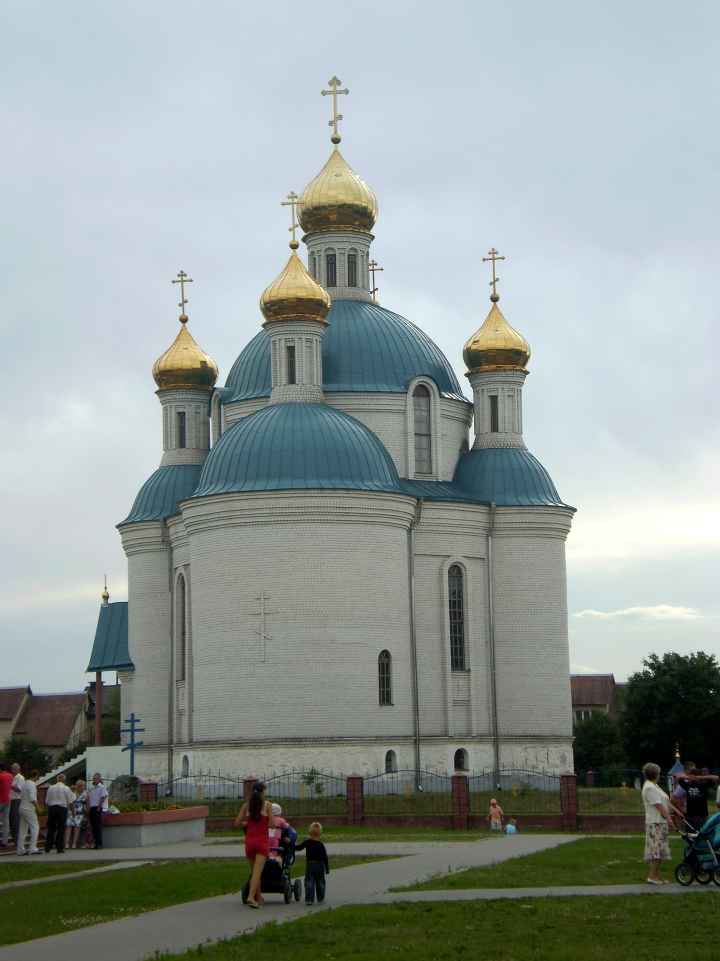 Царква